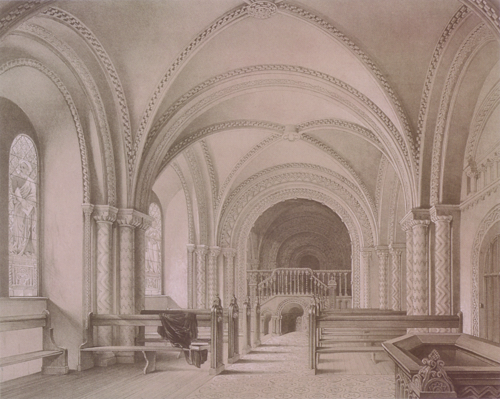 Lithografie der Schlosskapelle von Penrhyn Castle